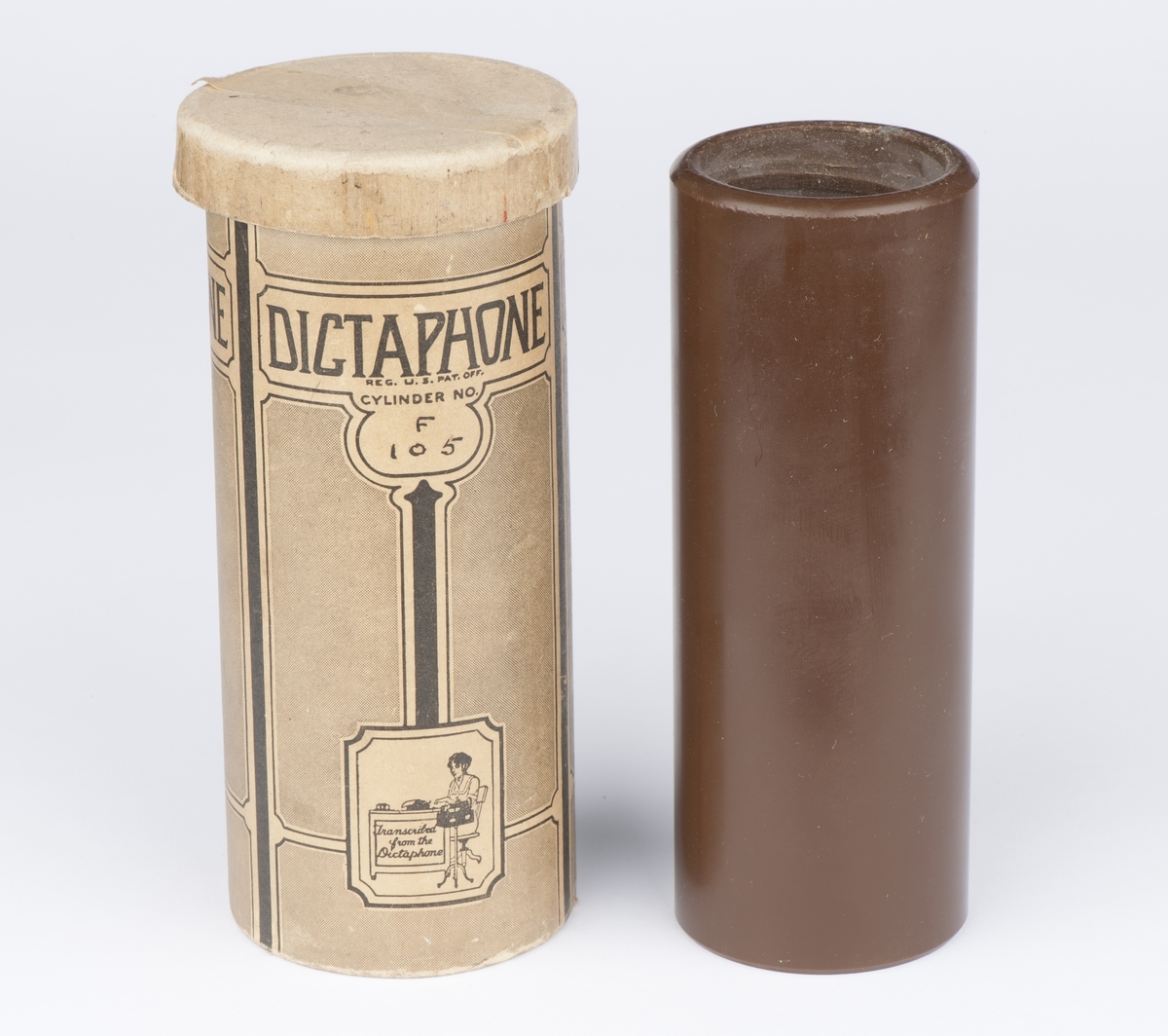 Diktafon. Vokssylinder